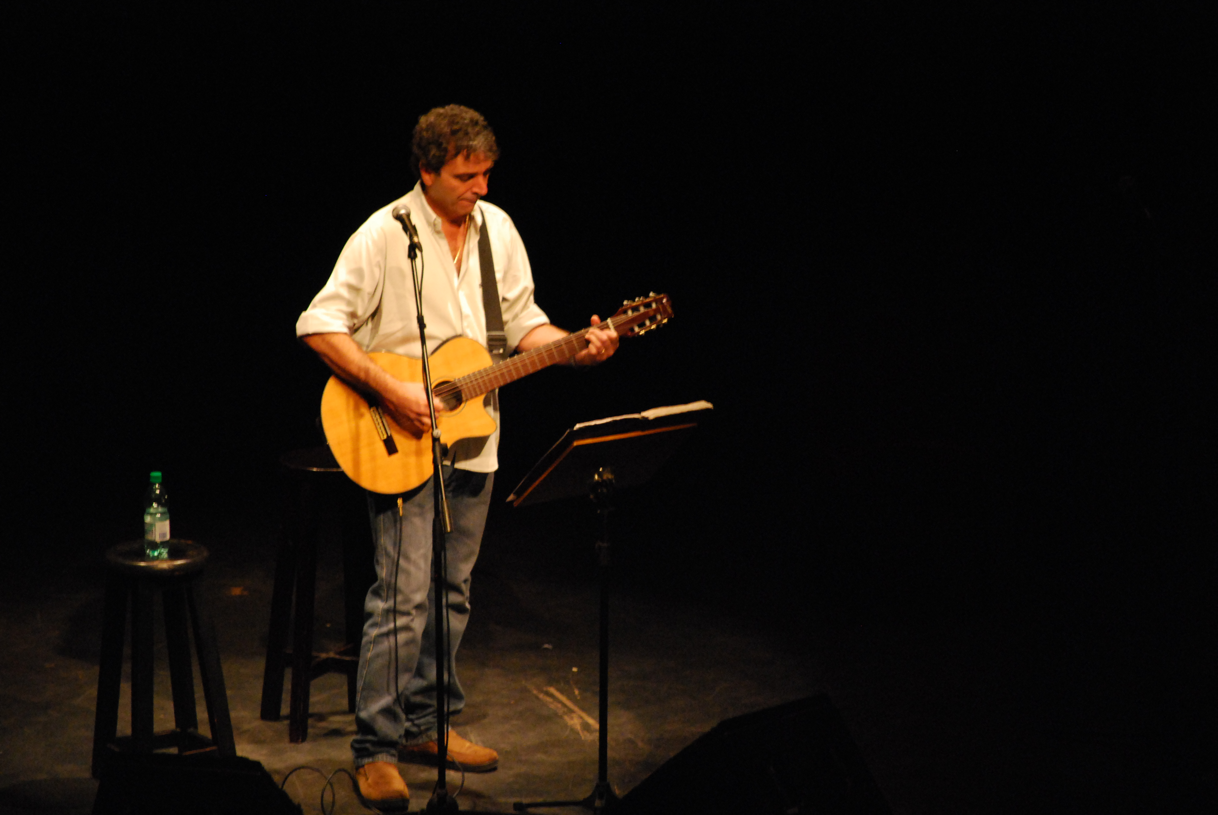 El cantautor argentino Ignacio Copani en su espectáculo "Veinte años" el día 22 de mayo de 2009, en la Sala Zitarrosa (Uruguay).